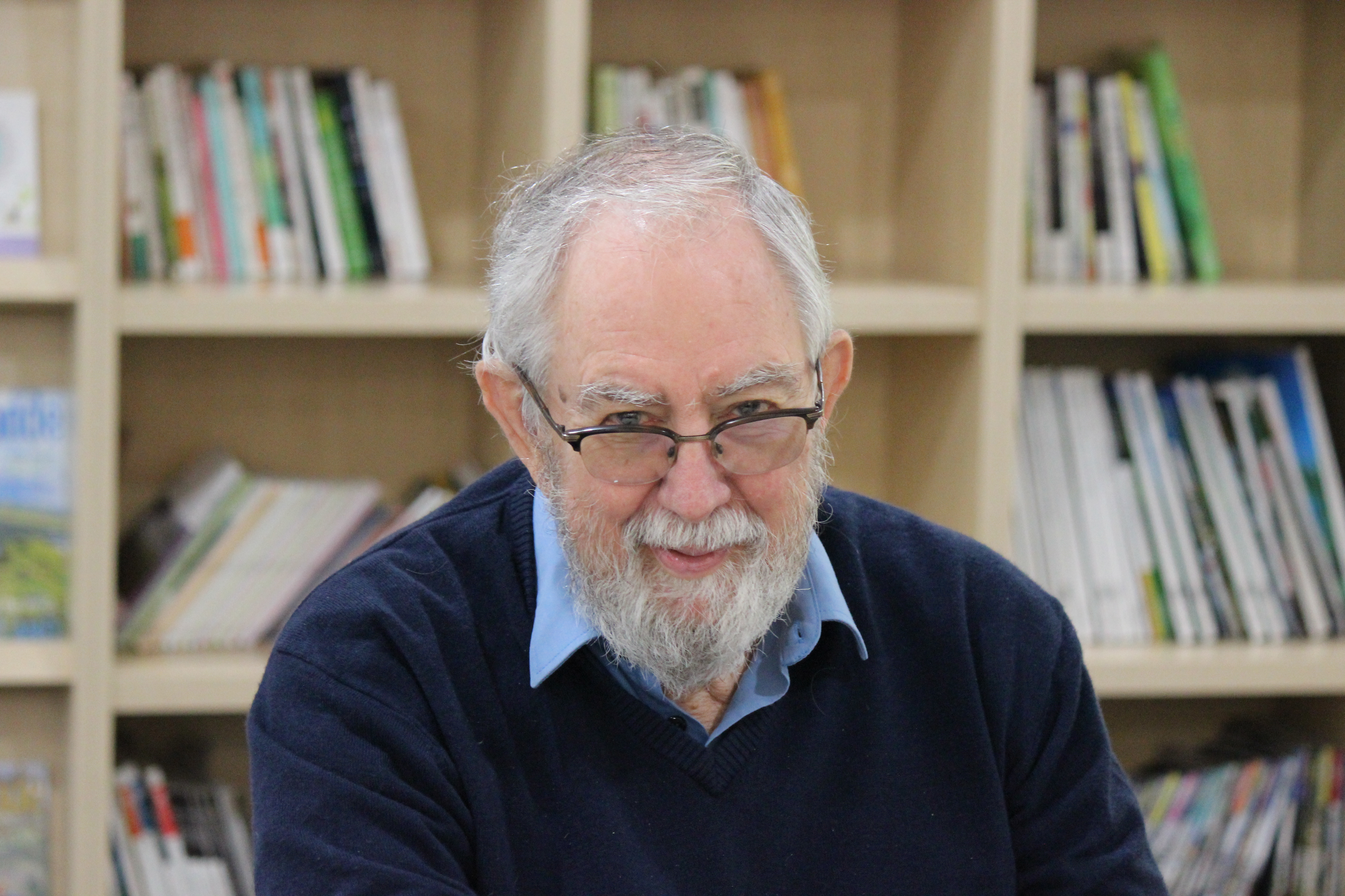 종교개혁 500주년 강사로 소망수양관에서 발표하는 존 W. 드 구루취 박사 (John W de Gruchy 2017-10-20)